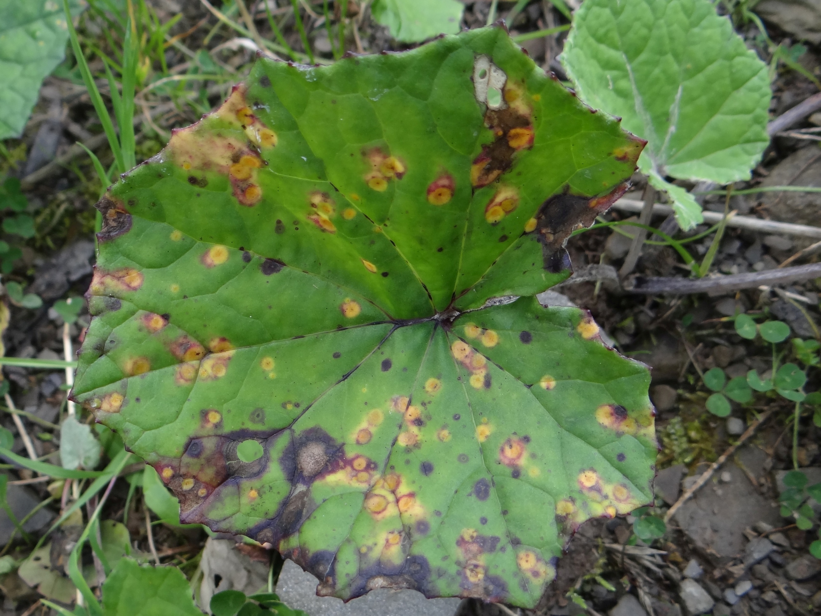 Puccinia poarum on Tussilago farfara